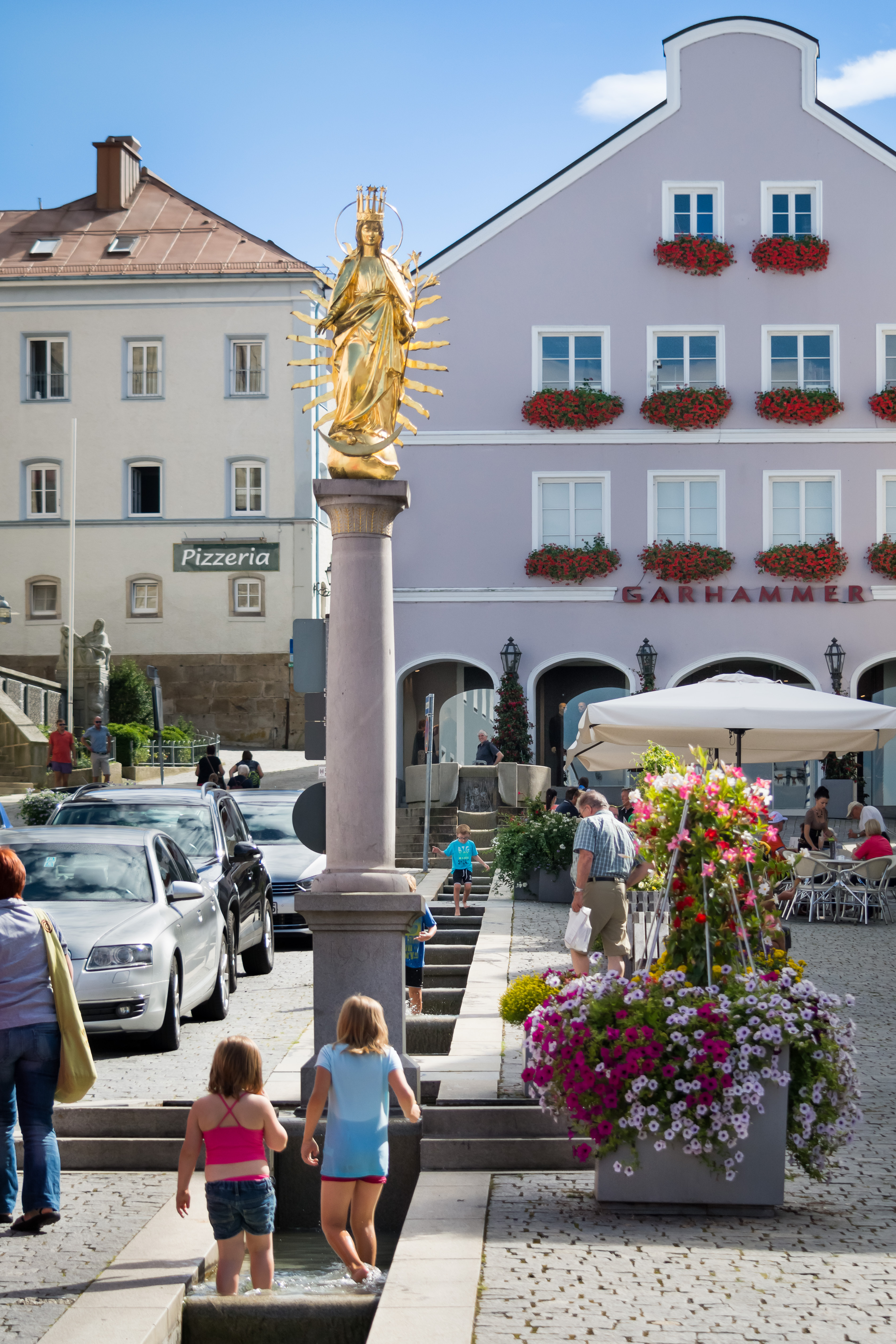 Darstellung der Maria Immaculata auf dem Marktplatz von Waldkirchen (Bayern), Metallguss mit Vergoldung; Granitsäule mit Palmettenkapitell, 1871. Baudenkmal D-2-72-151-40This is a photograph of an architectural monument.